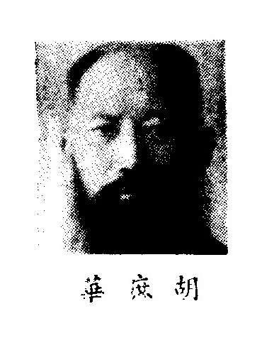 中文（中国大陆）: 制憲國民大會代表